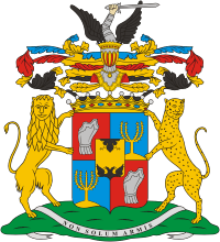 Герб рода графов Румянцевых